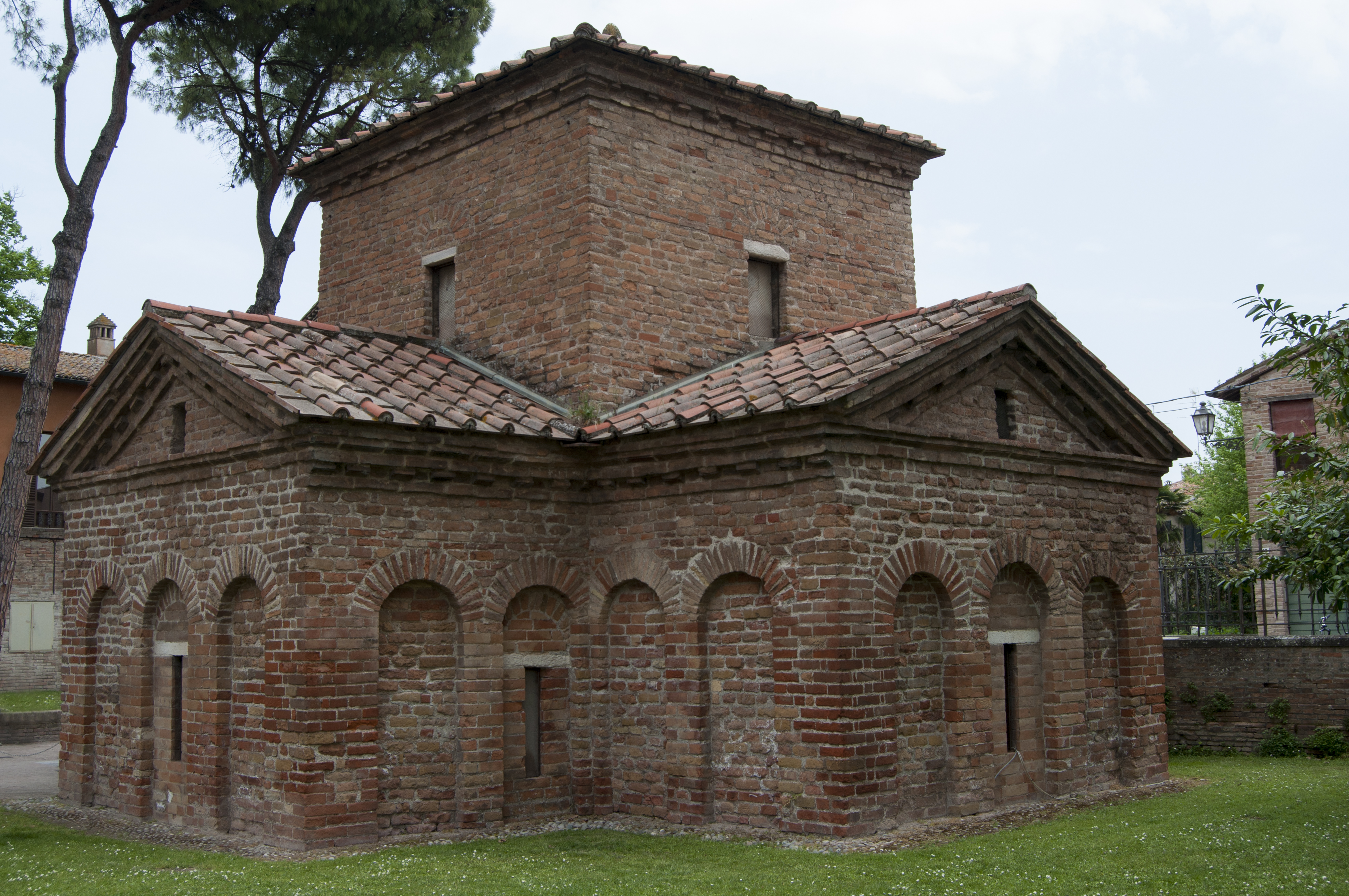 Mausoleo di Galla Placidia - MIBAC This is a photo of a monument which is part of cultural heritage of Italy.